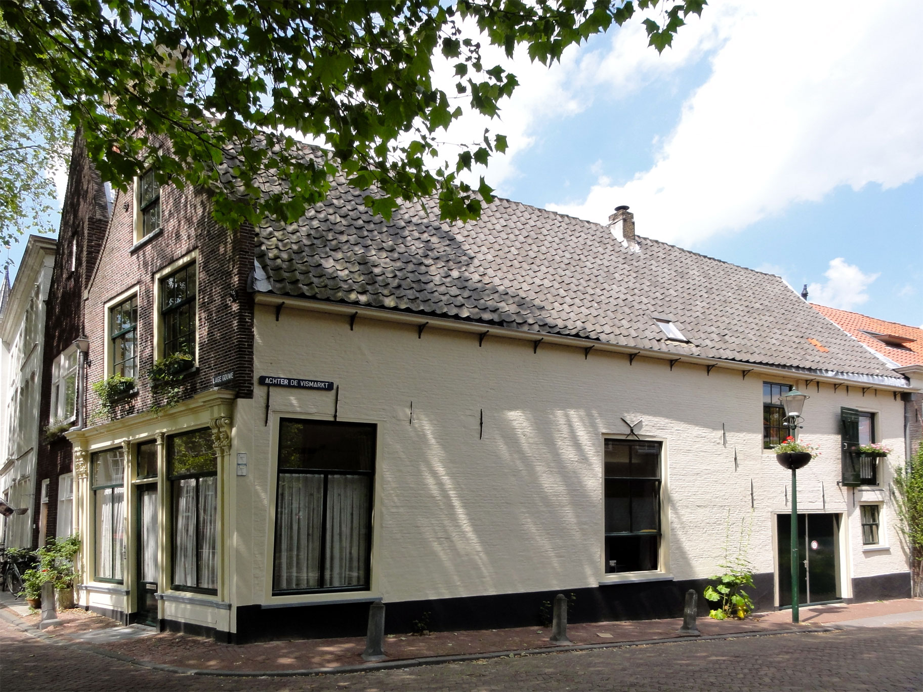 Lage Gouwe 112 Gouda, rijksmonument